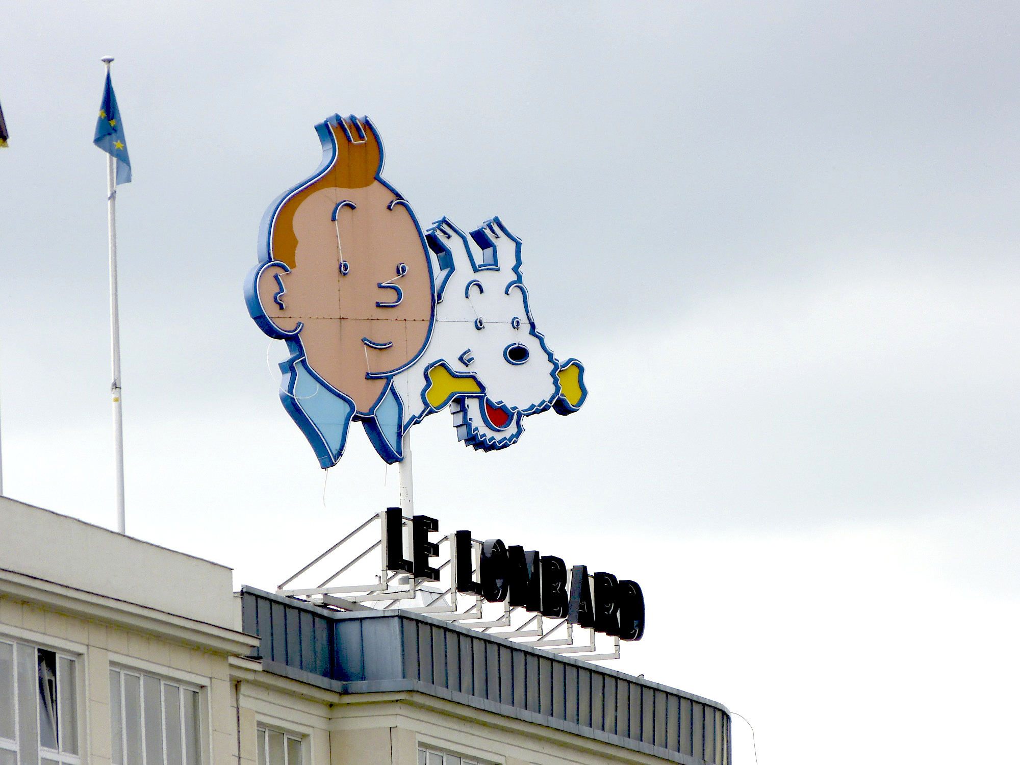 Kuifje en Bobbie in de Brusselse Paul-Henri Spaaklaan, boven het gebouw waar Uitgeverij Lombard is gevestigd